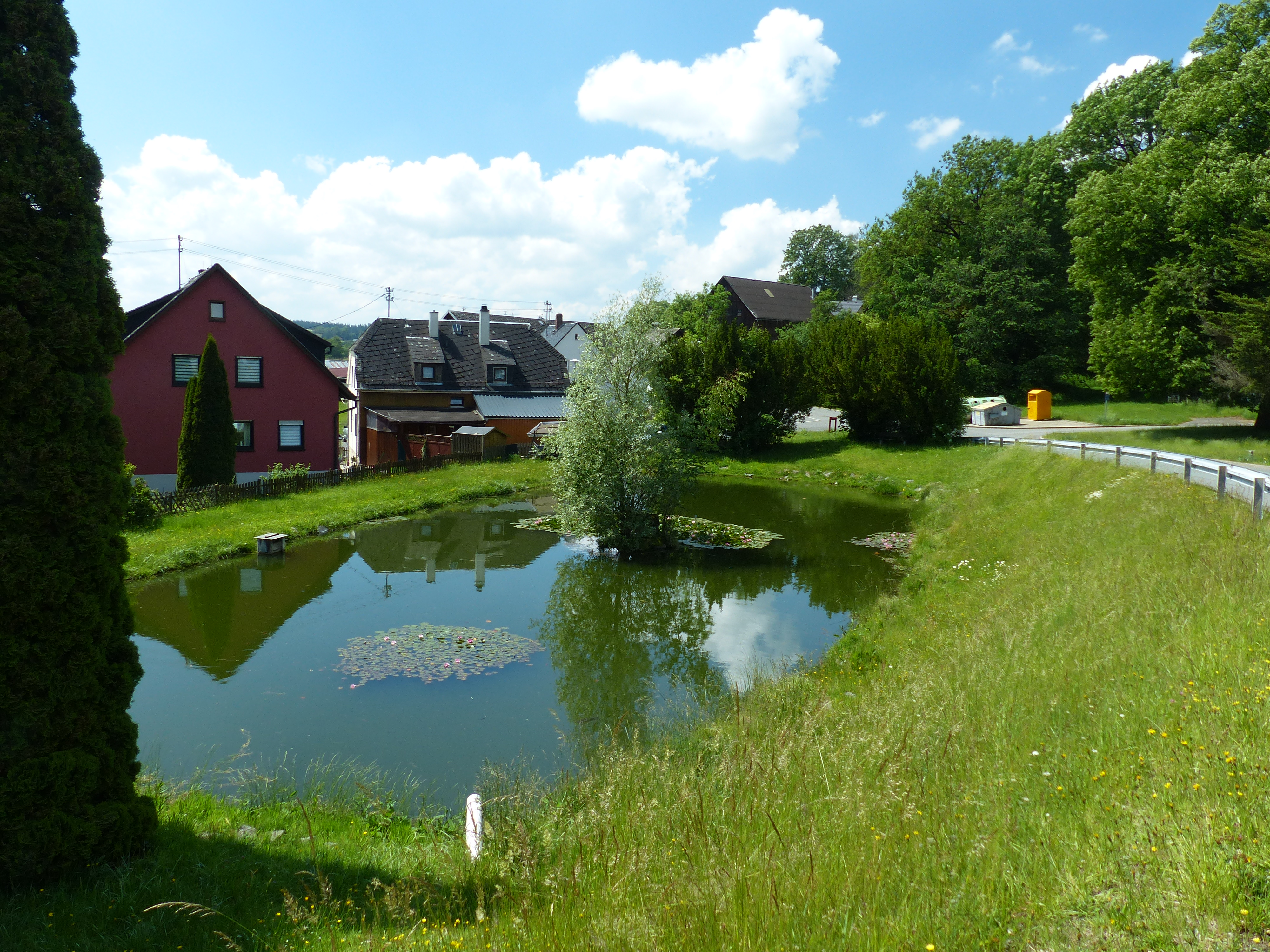 Ortsansichten vom Ortsteil Poppenreuth